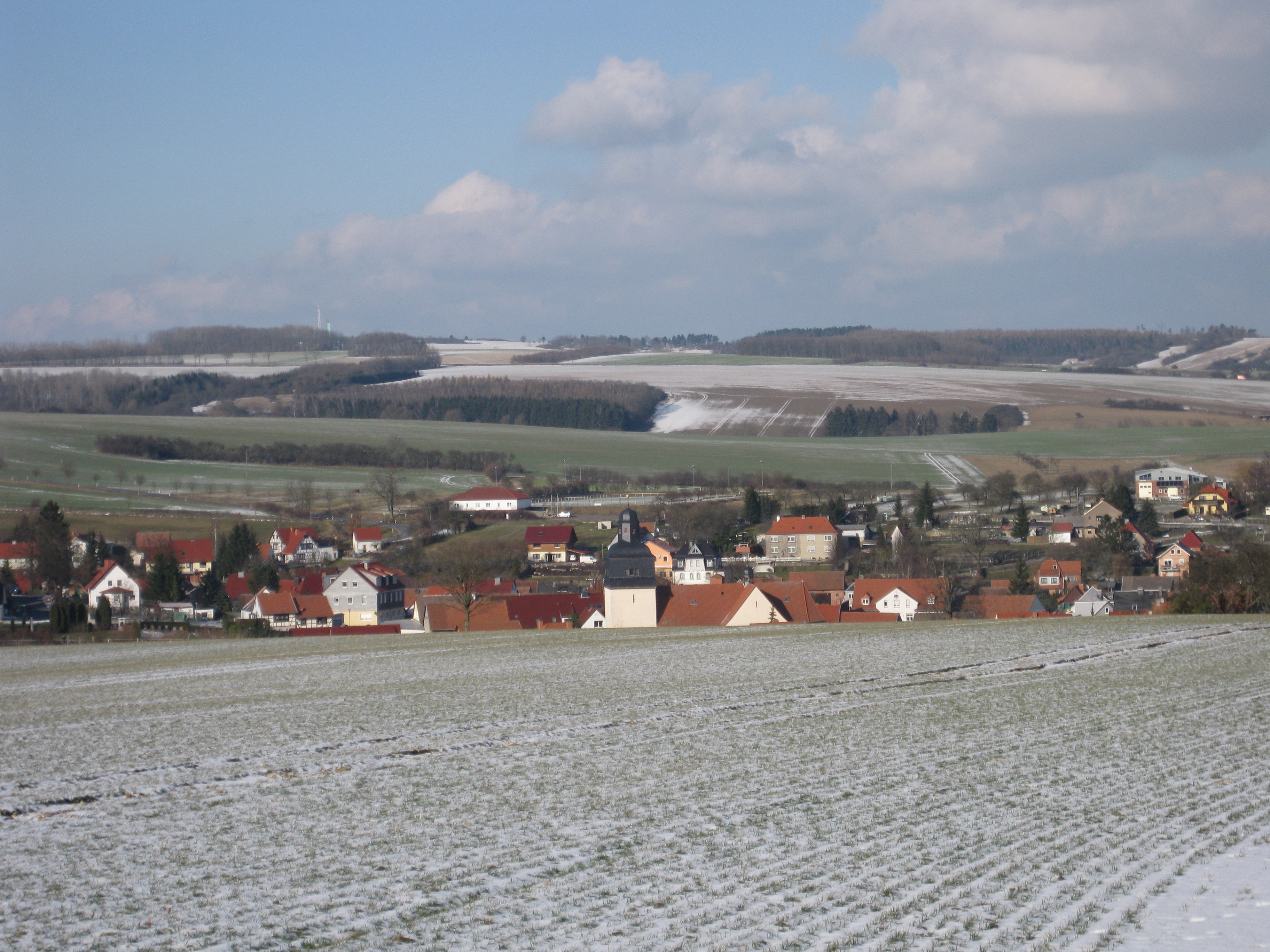 Kefferhausen im Eichsfeld (im Hintergrund der Dün mit dem Hockelrain)